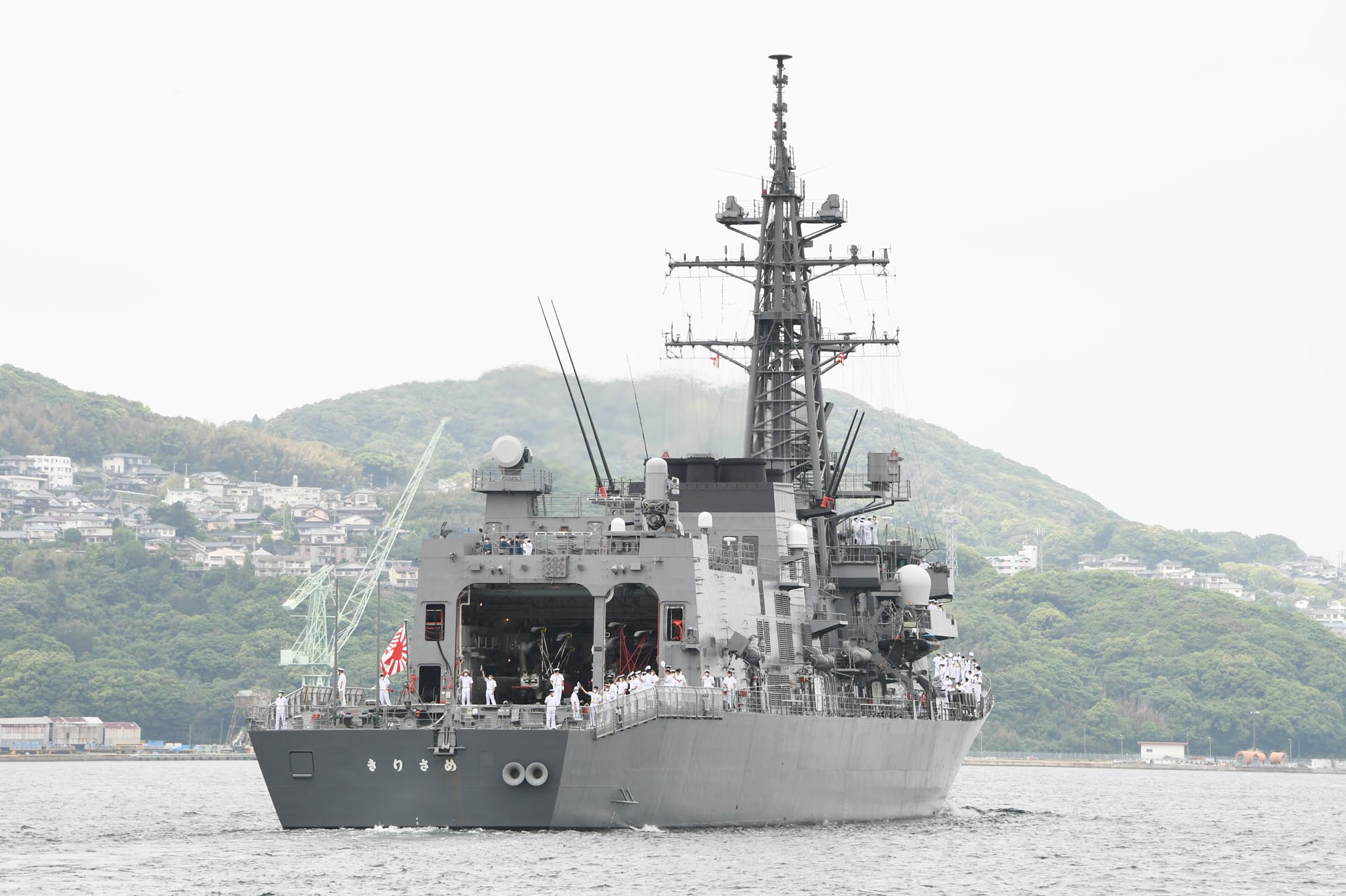 情報収集活動に派遣される護衛艦「きりさめ」